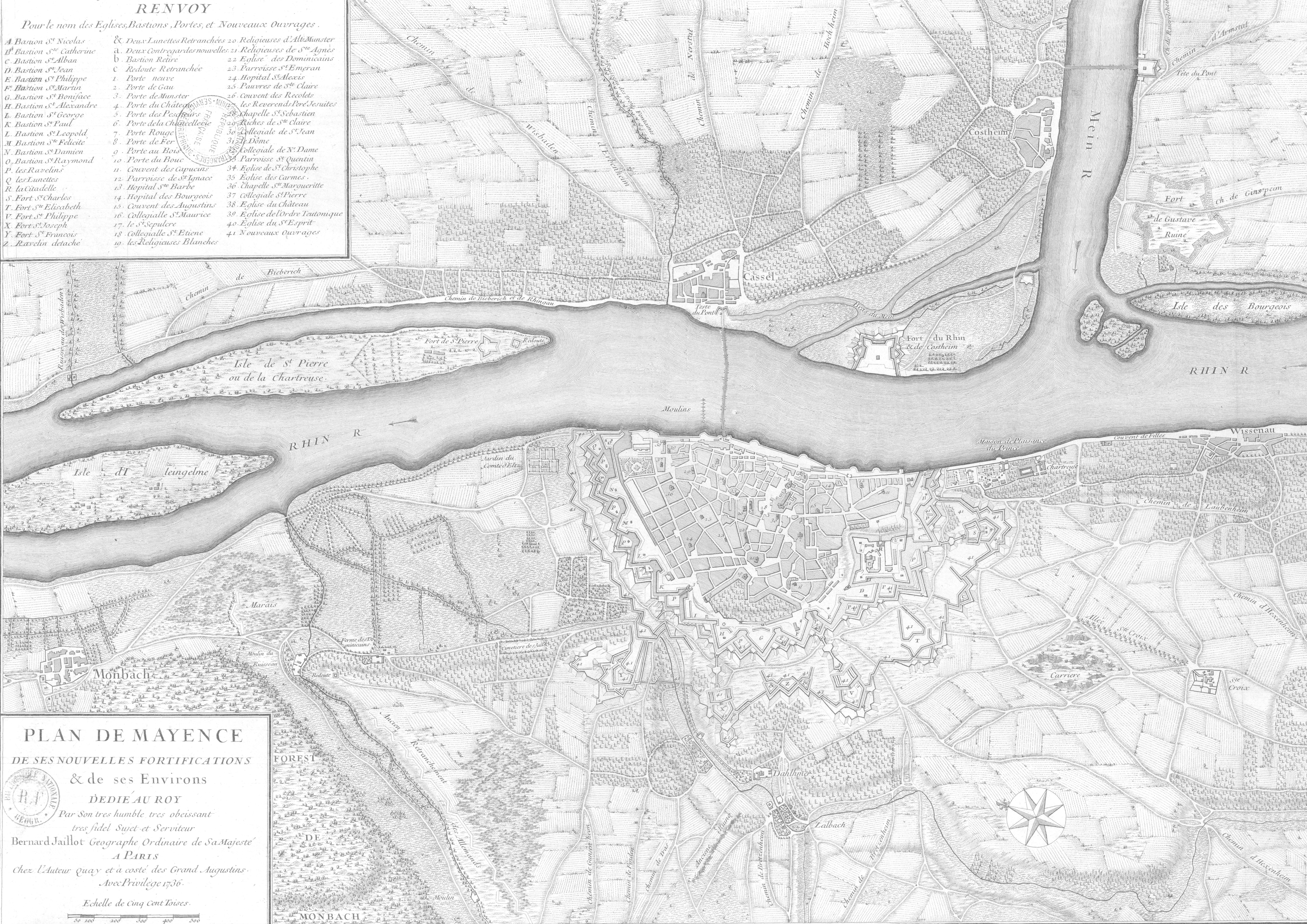 Plan de Mayence, de ses nouvelles fortifications et de ses environs, dédié au Roy par... Bernard Jaillot, ... / Gravé par le Sr. Coquart. Par : Bernard-Jean-Hyacinthe (1673-1739). Auteur du texte Bernard Jaillot et Antoine Coquart.